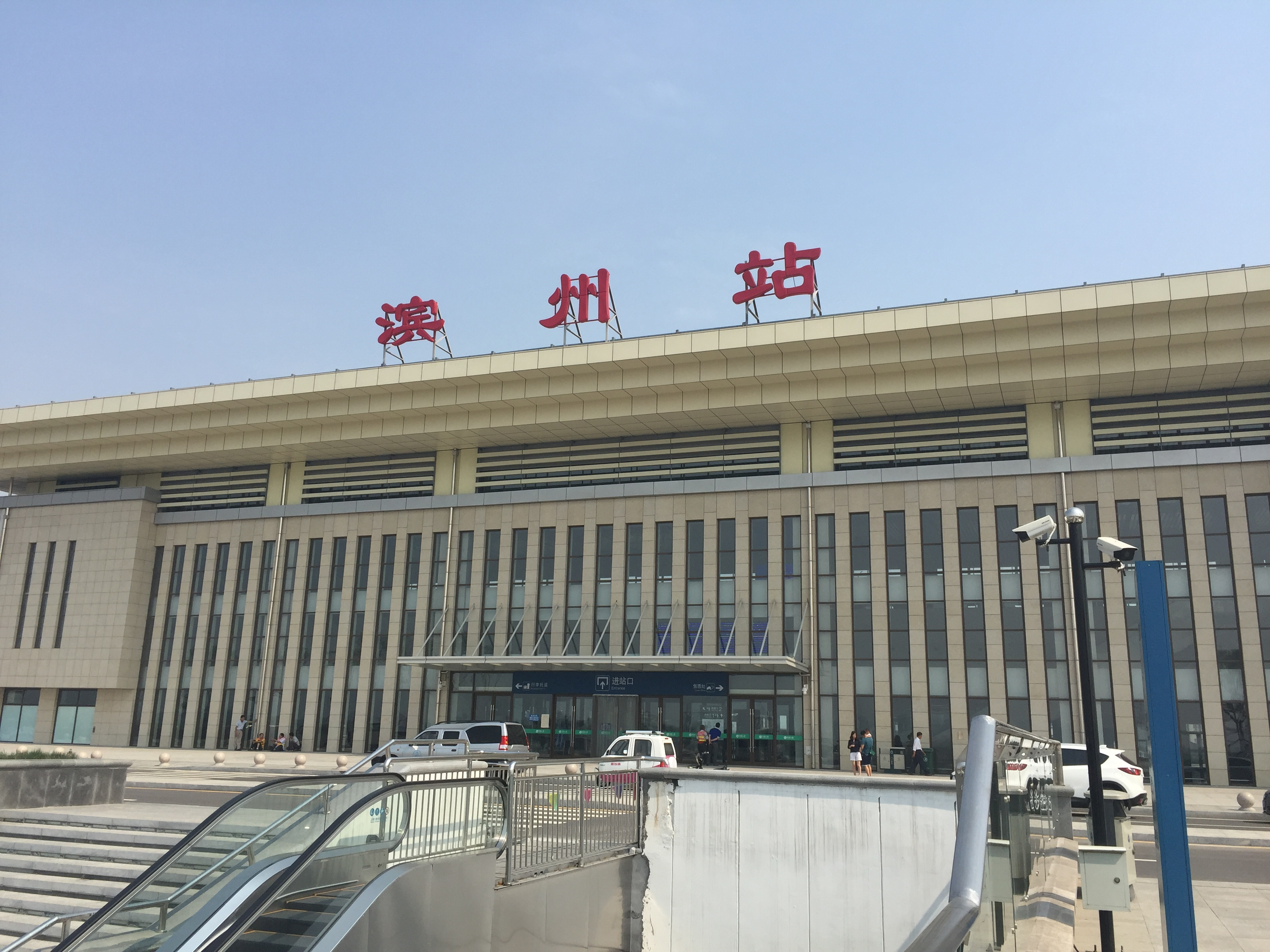 中文（中国大陆）: 滨州火车站，2016年6月。